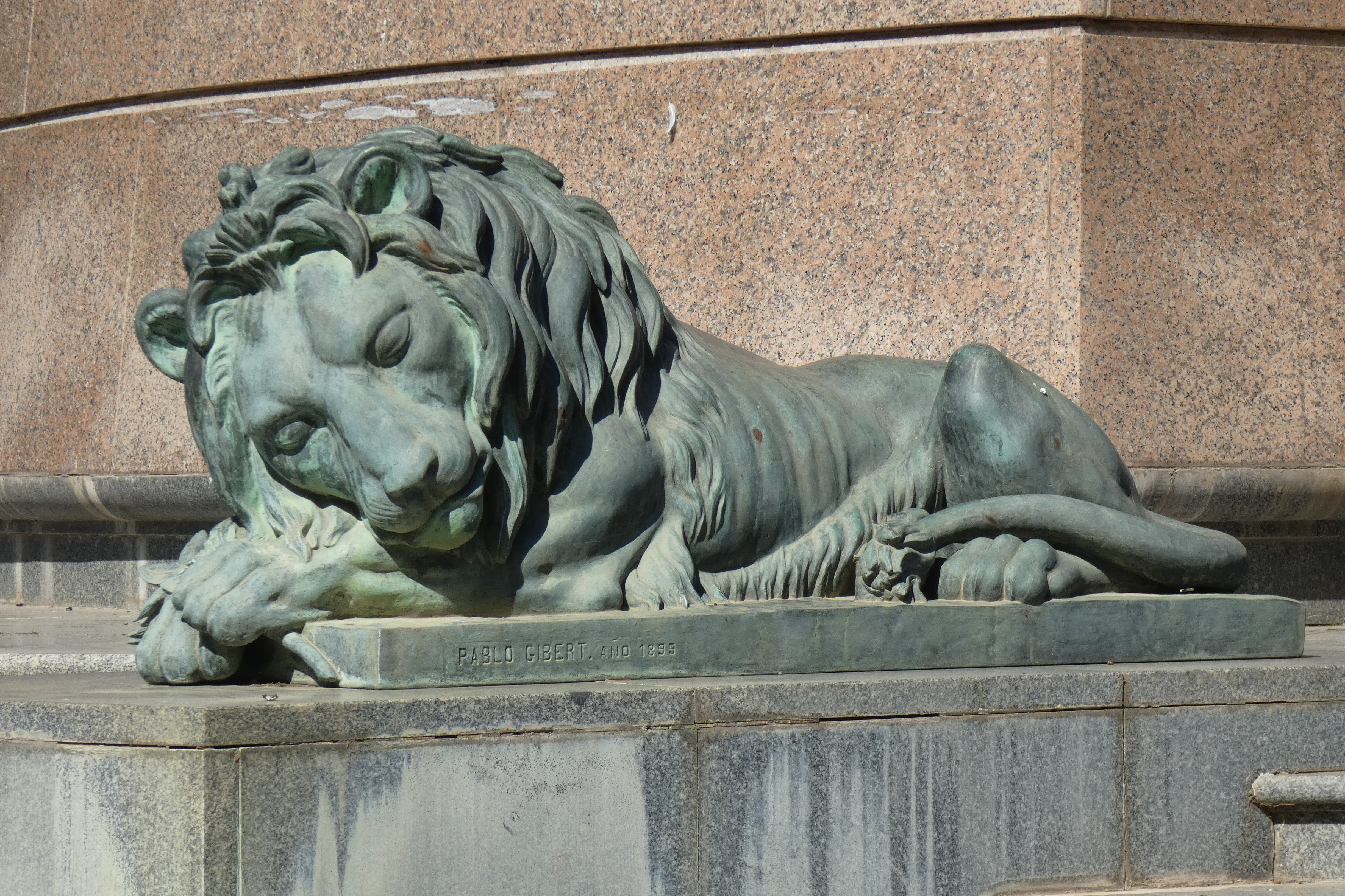 Monumento a Espartero Leon